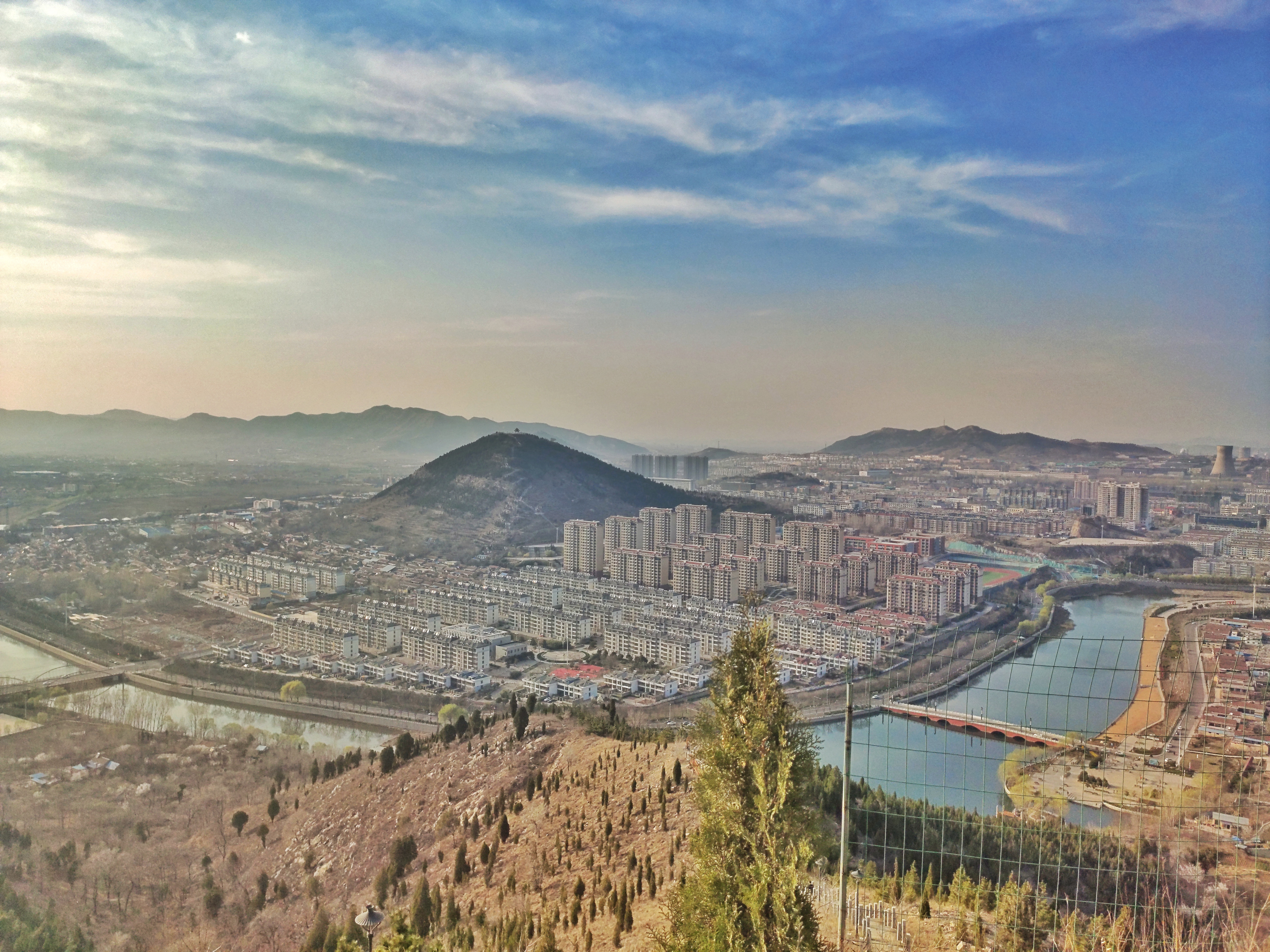 由双凤山俯瞰钢城城区